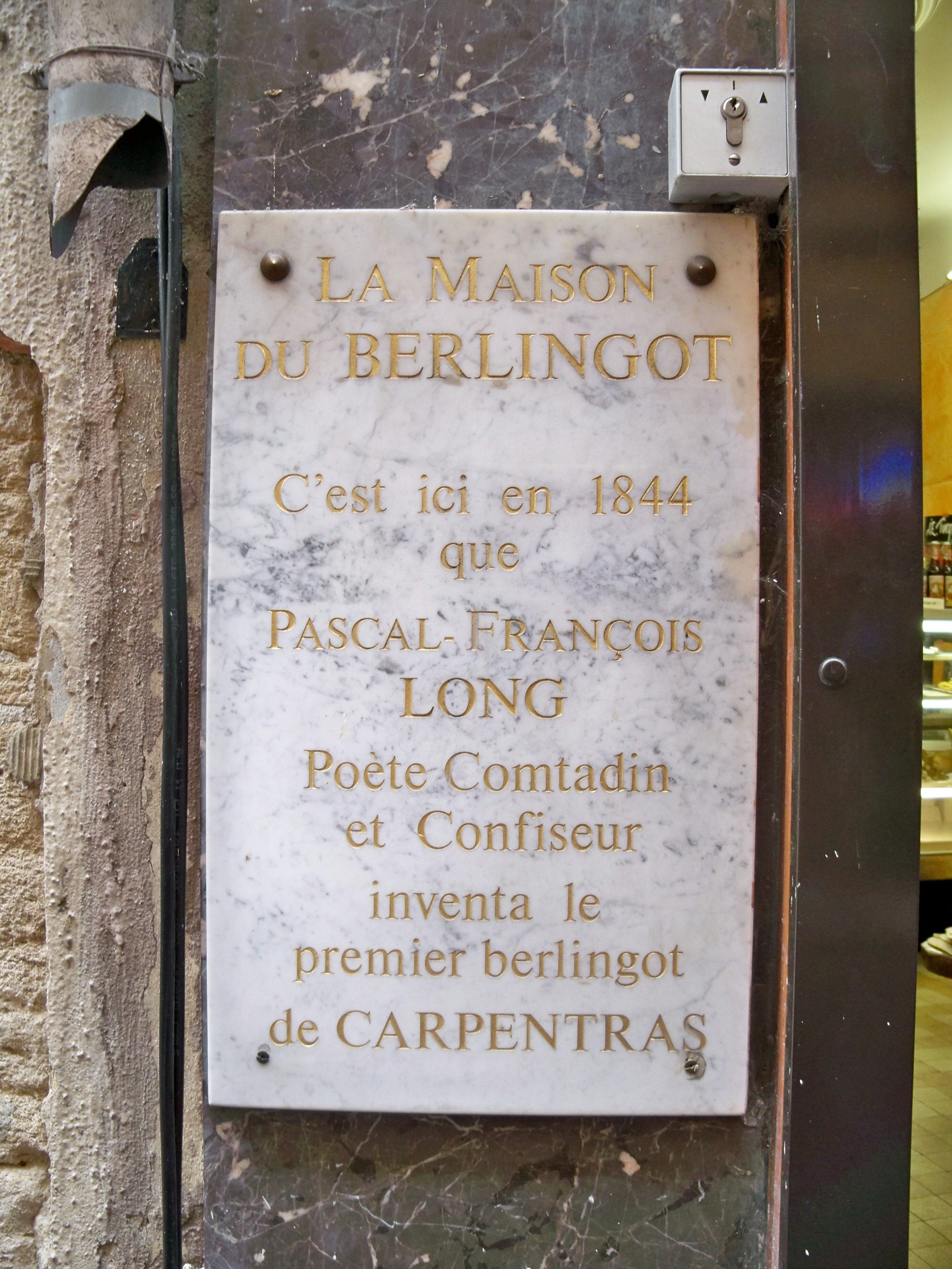 plaque pour la 1er fabrication à Carpentras (Vaucluse), en 1844.